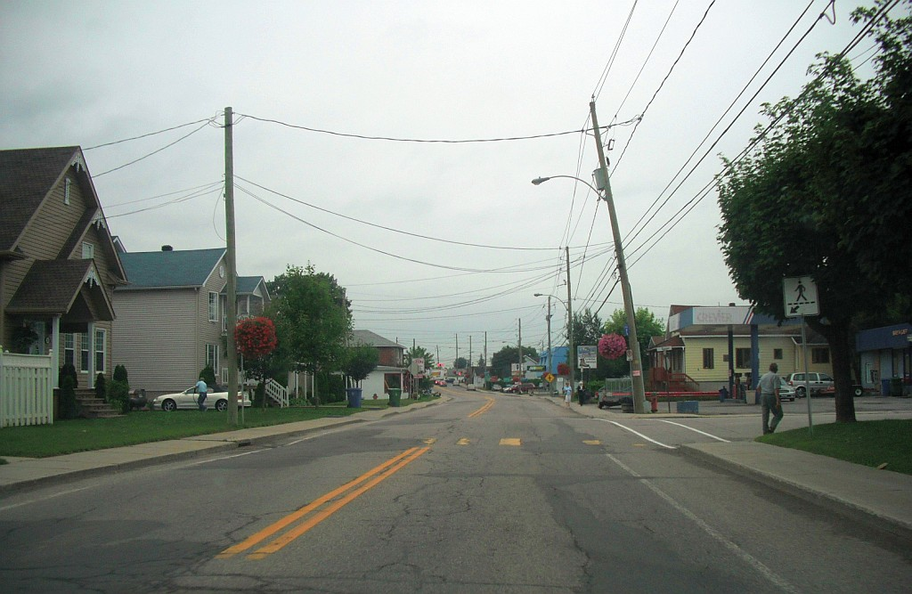 Vue à l'intérieur de la ville de Thurso, en Outaouais, au Québec.